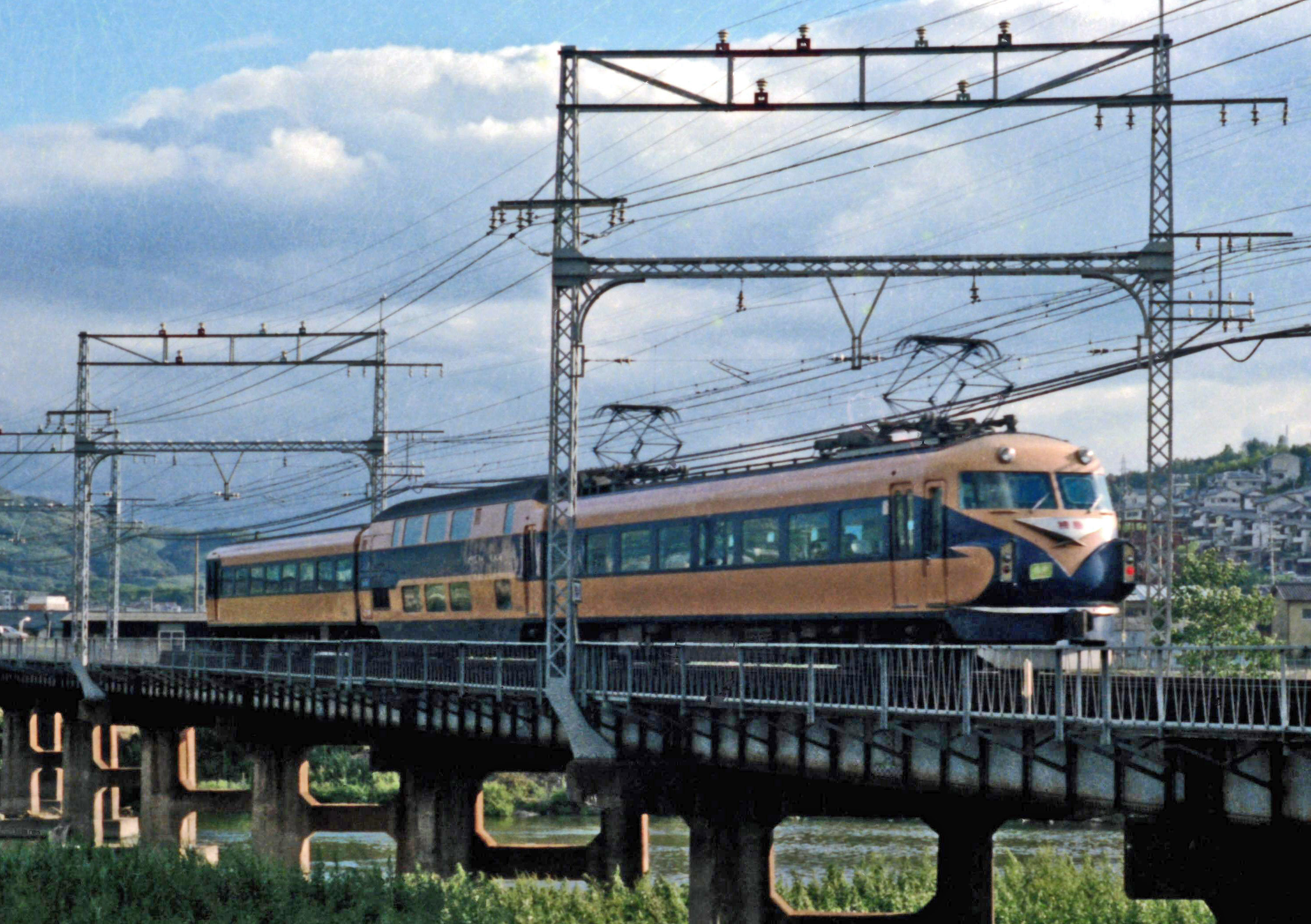 近鉄 10100（A編成） 昭和53年頃 河内国分駅付近（大和川橋梁）